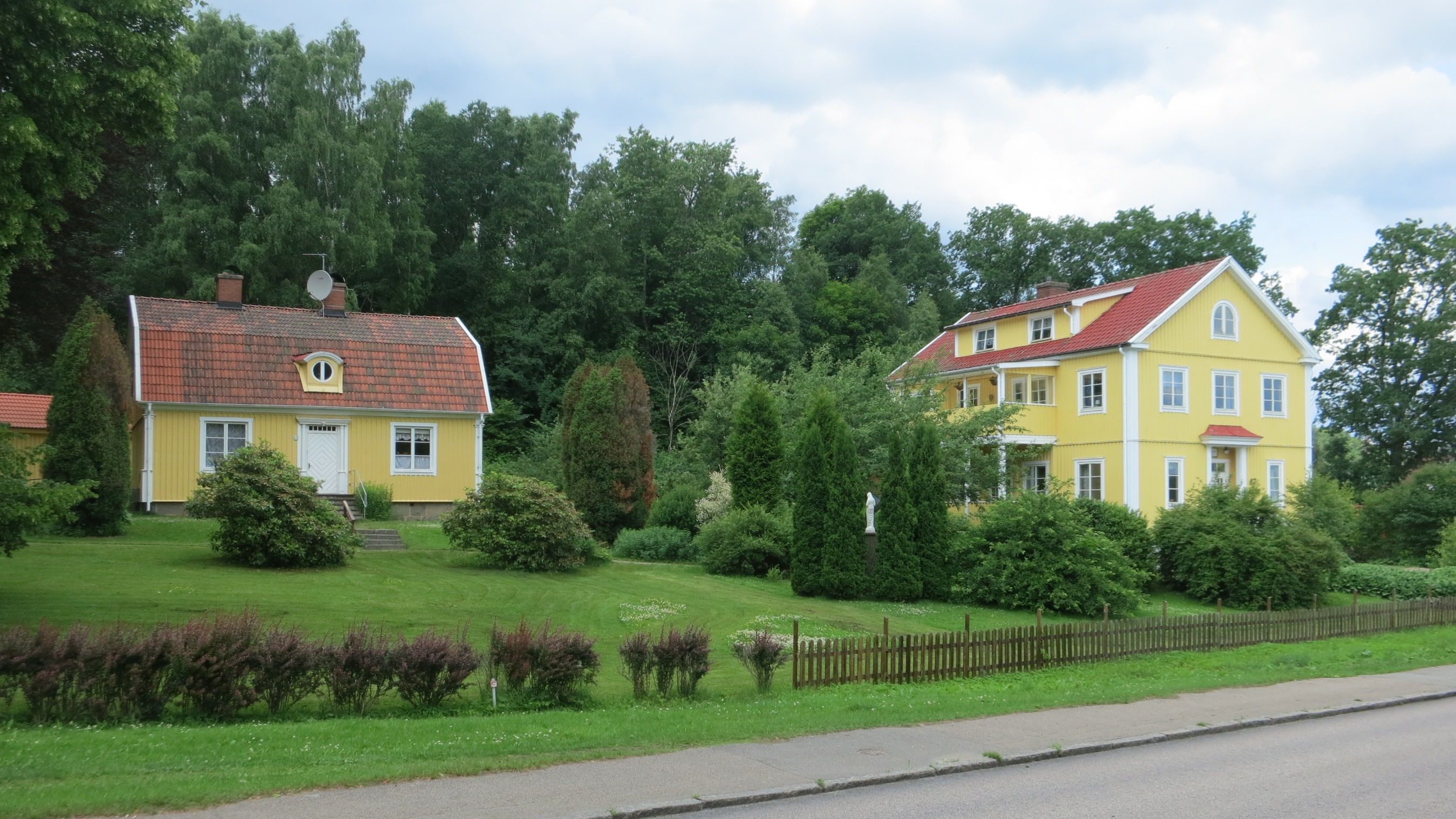 Katolska barn- och vilohemmet med prästbostad i Oskarström, Halland